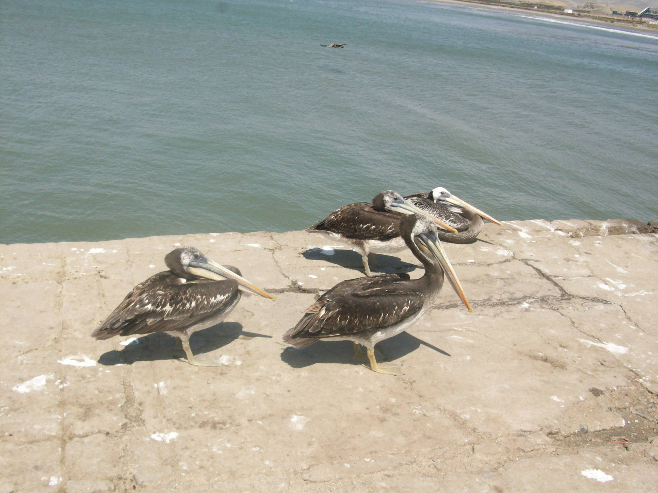 Pelícanos Peruvianos en Puerto Huarmey, Ancash, Perú